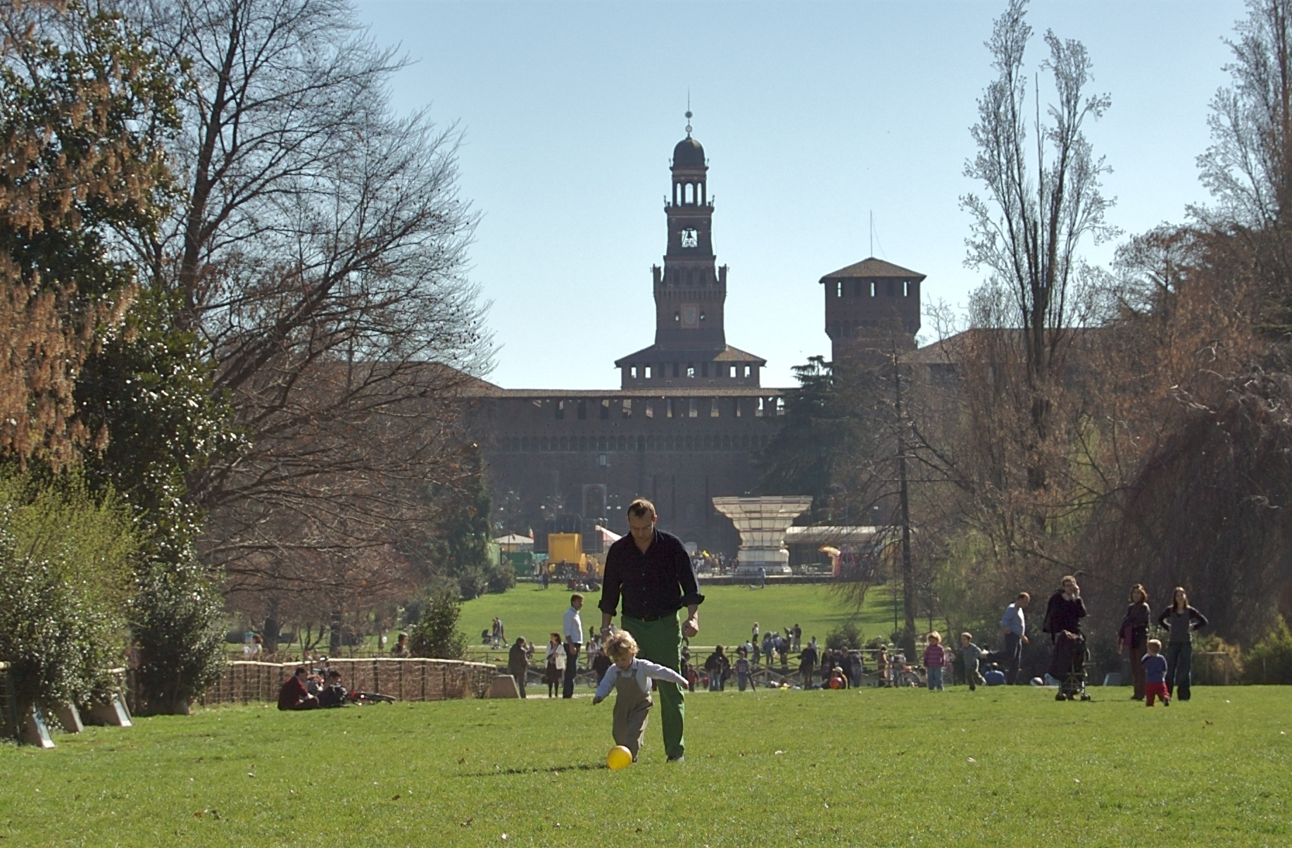 Castello di Milano visto dal Parco Sempione